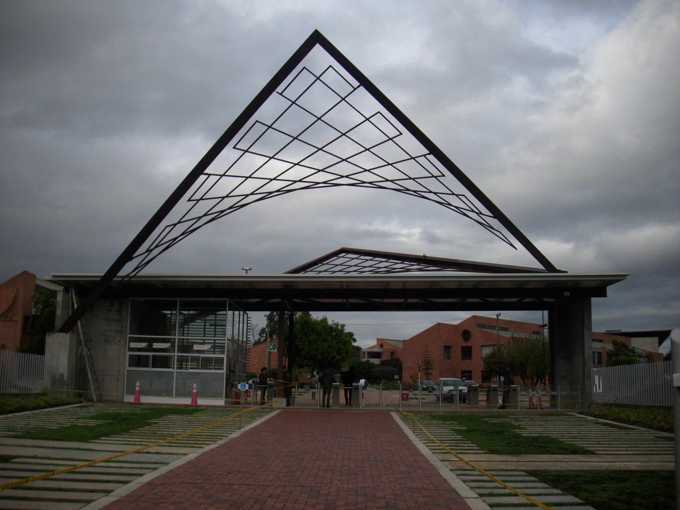 Entrada Peatonal ECI